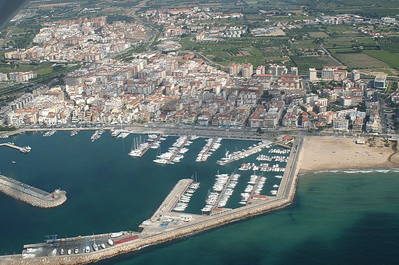 Vista aera del puerto de Cambrils (en primer plano), del barrio de la Marina, Eixample Port, Eixample Vila, y al fondo casco antiguo de la villa y barrios Perellada y Nou Cambrils